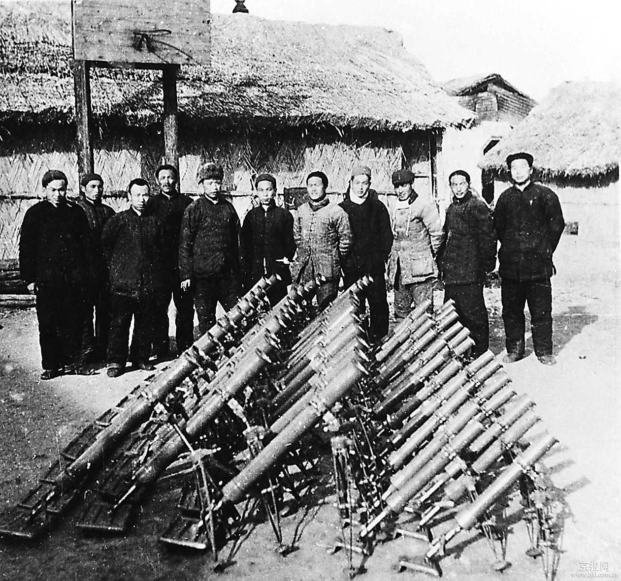 中文（中国大陆）: 黄桥战役中新四军缴获的部分武器